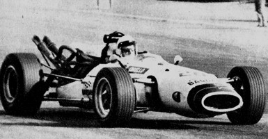 Prototipo Berta-Tornado de F-1 Argentina. Piloto: Eduardo Copello.